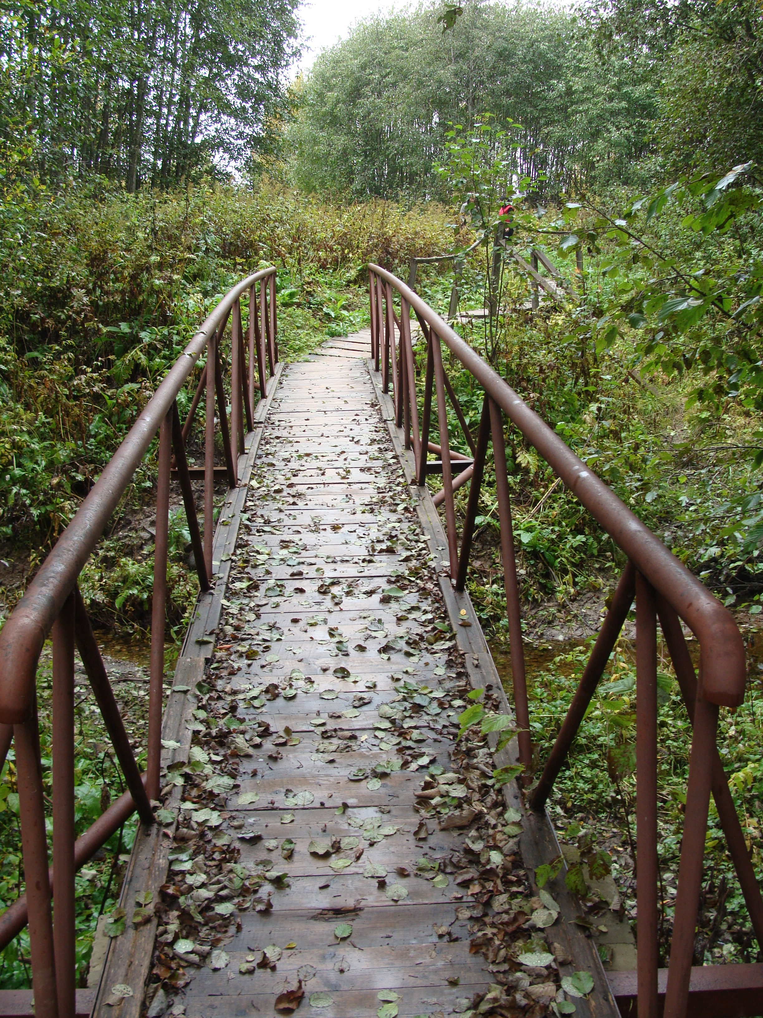 Река Черемушка. Христофорова пустынь